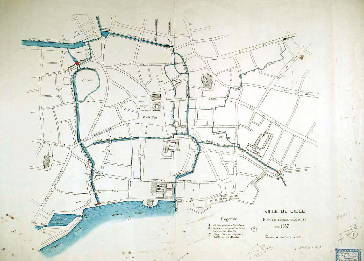 Titre du document: Plan des canaux intérieurs en 1857 Cote Bibliothèque Municipale de Lille : carton 9, 5 Type de document : plan 53 x 71 cm